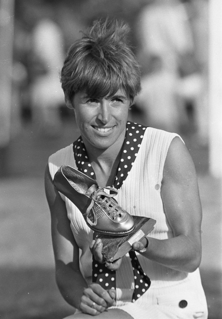 Atletiek te Leiden om de Gouden Spike . Ilja Keizer Laman won de Gouden Spike , beste prestatie 800m.